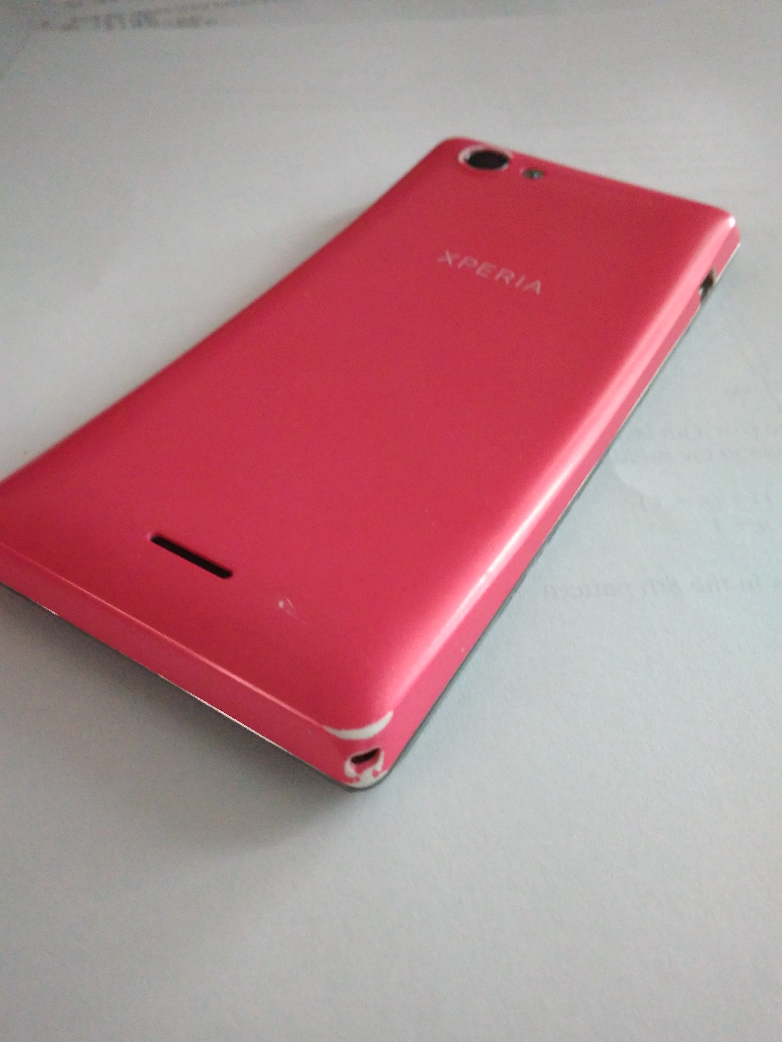 反面